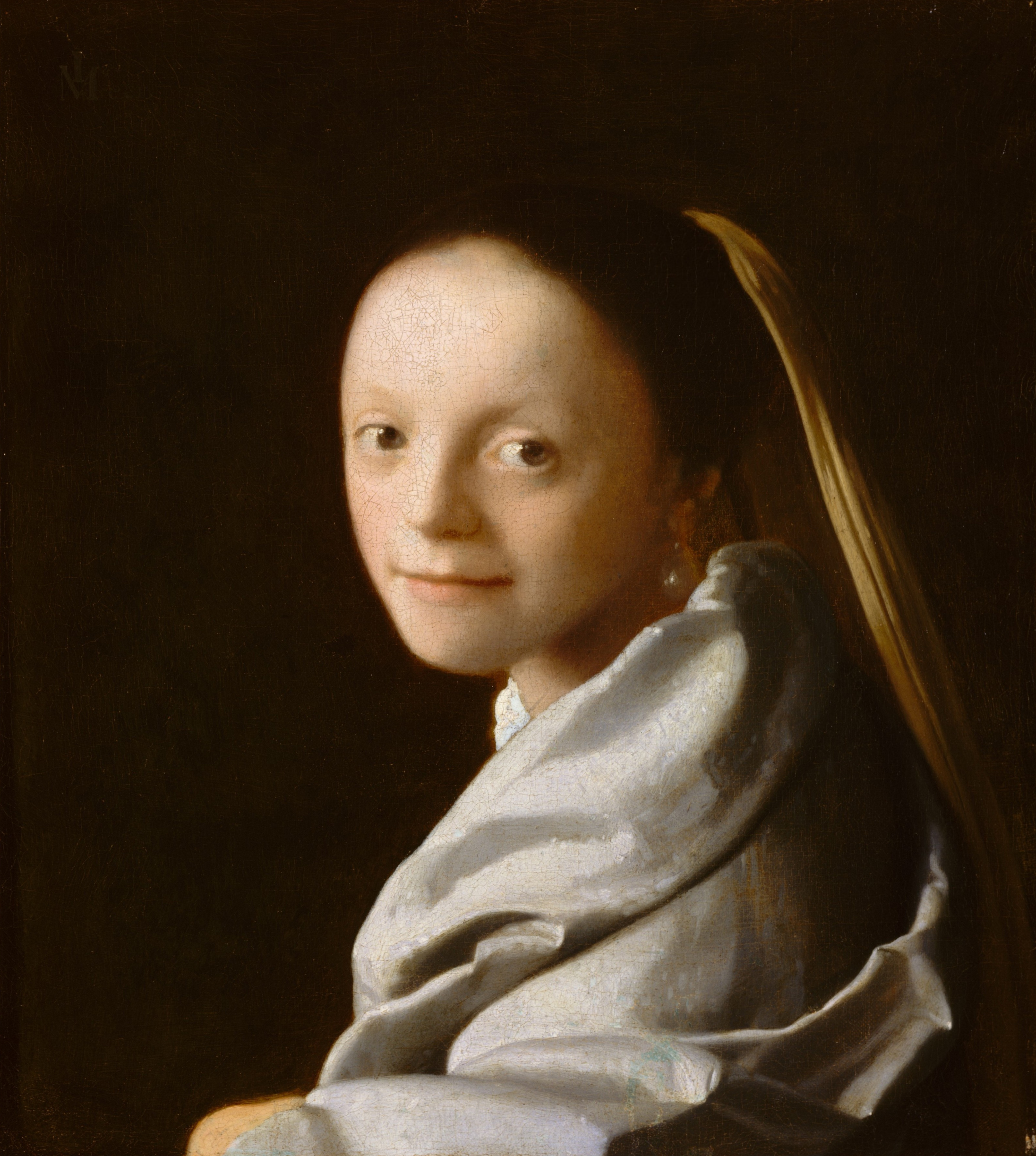 پرتره بانوی جوان یا بانوی با روسری اثر یوهانس فرمیر (۱۶۶۶-۱۶۶۷)این نقاشی که به وسیله رنگ روغن روی بوم کشیده شده است در موزه متروپولیتن نیویورک نگهداری می‌گردد.